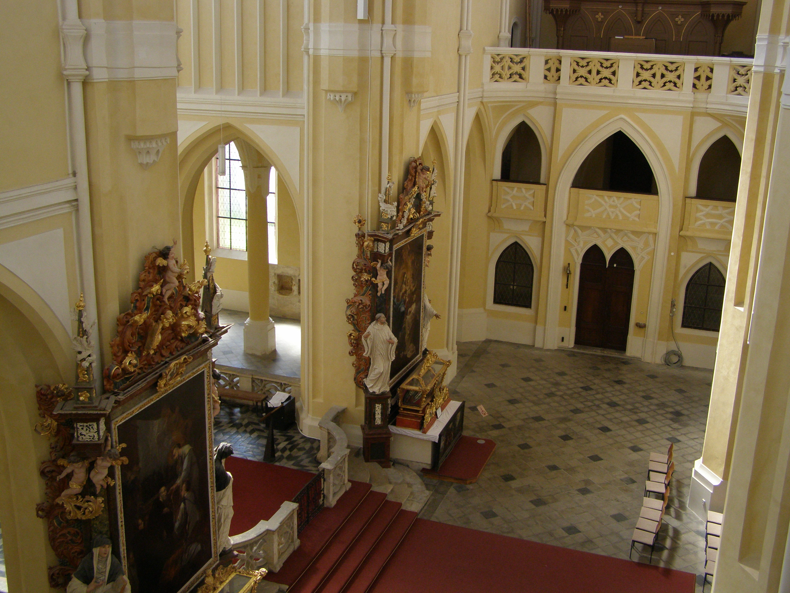 Česky: Kutná Hora, část Sedlec, klášterní kostel Nanebevzetí Panny Marie a svatého Jana Křtitele, transept